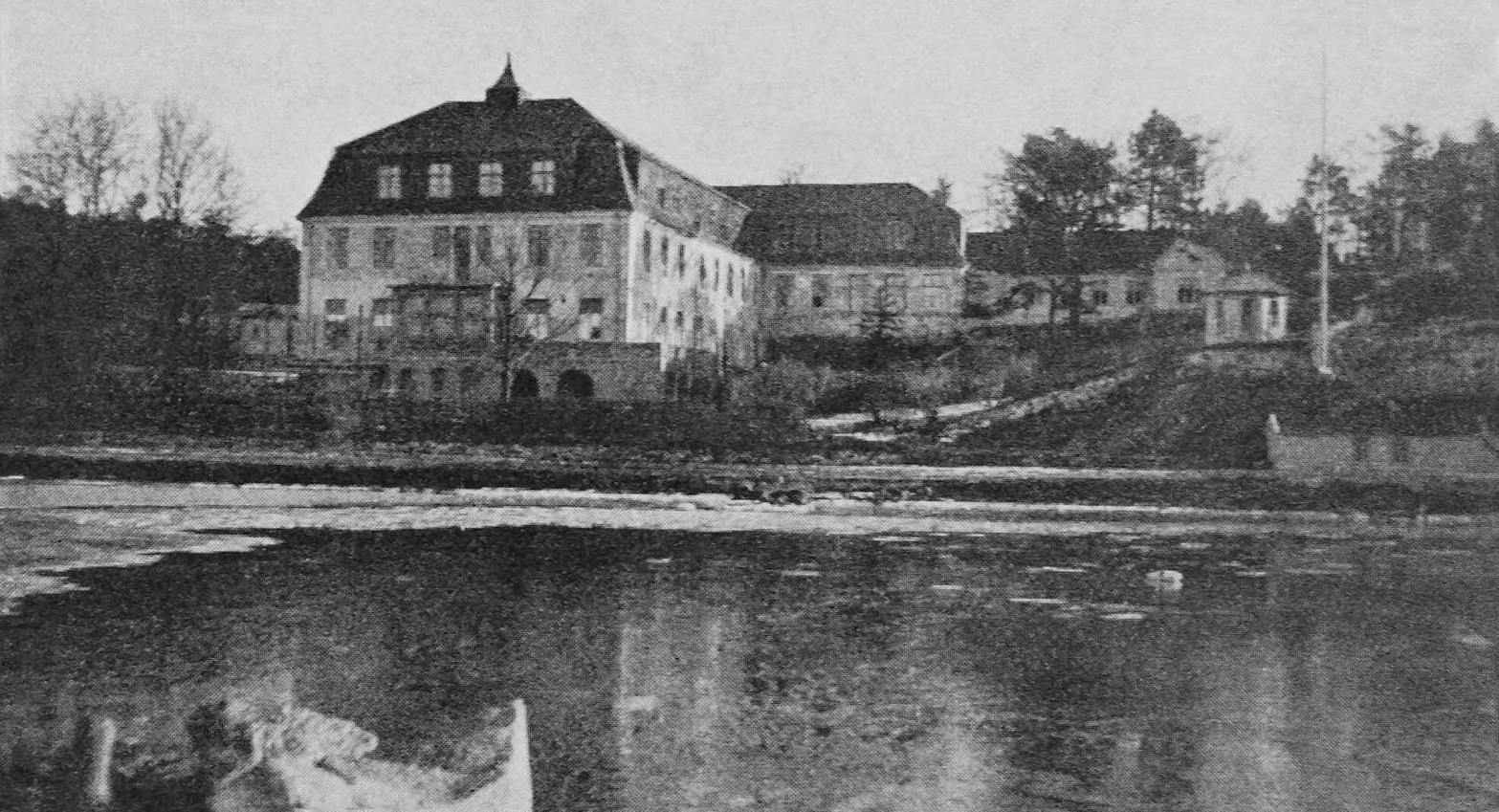 Illustrasjon hentet fra boken "Norske kvinners sanitetsforening" av og utgitt av (Oslo, 1930)